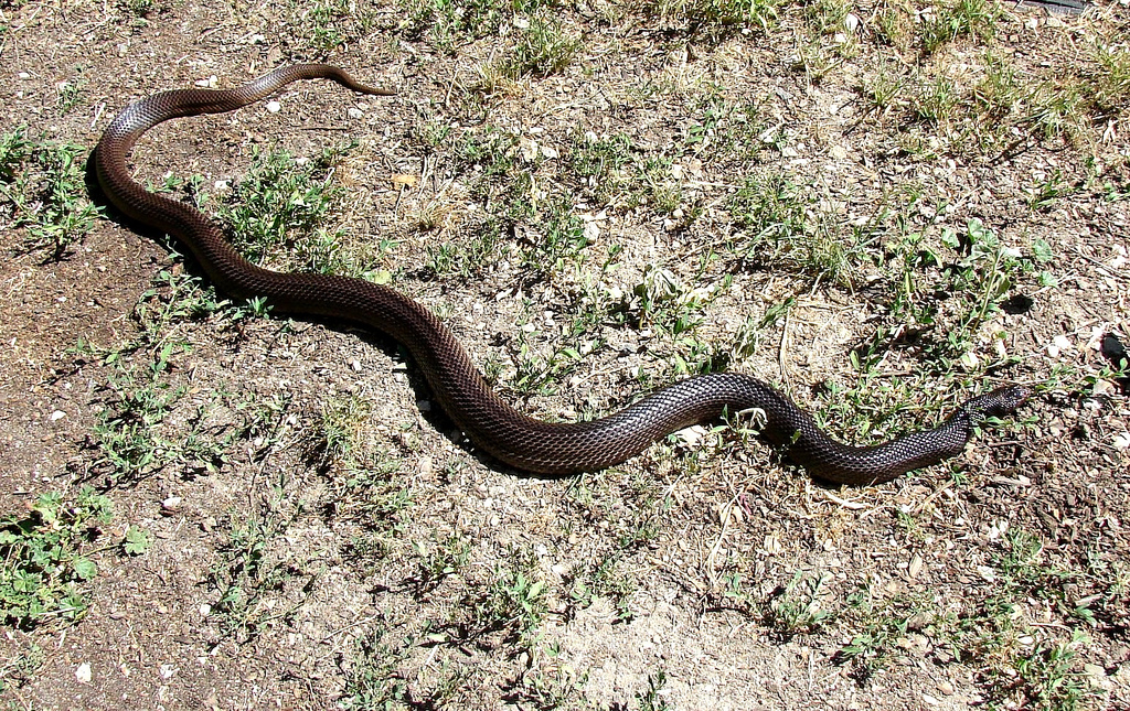 Black Pine Snake, Pituophis melanoleucus lodingi, in Mississippi